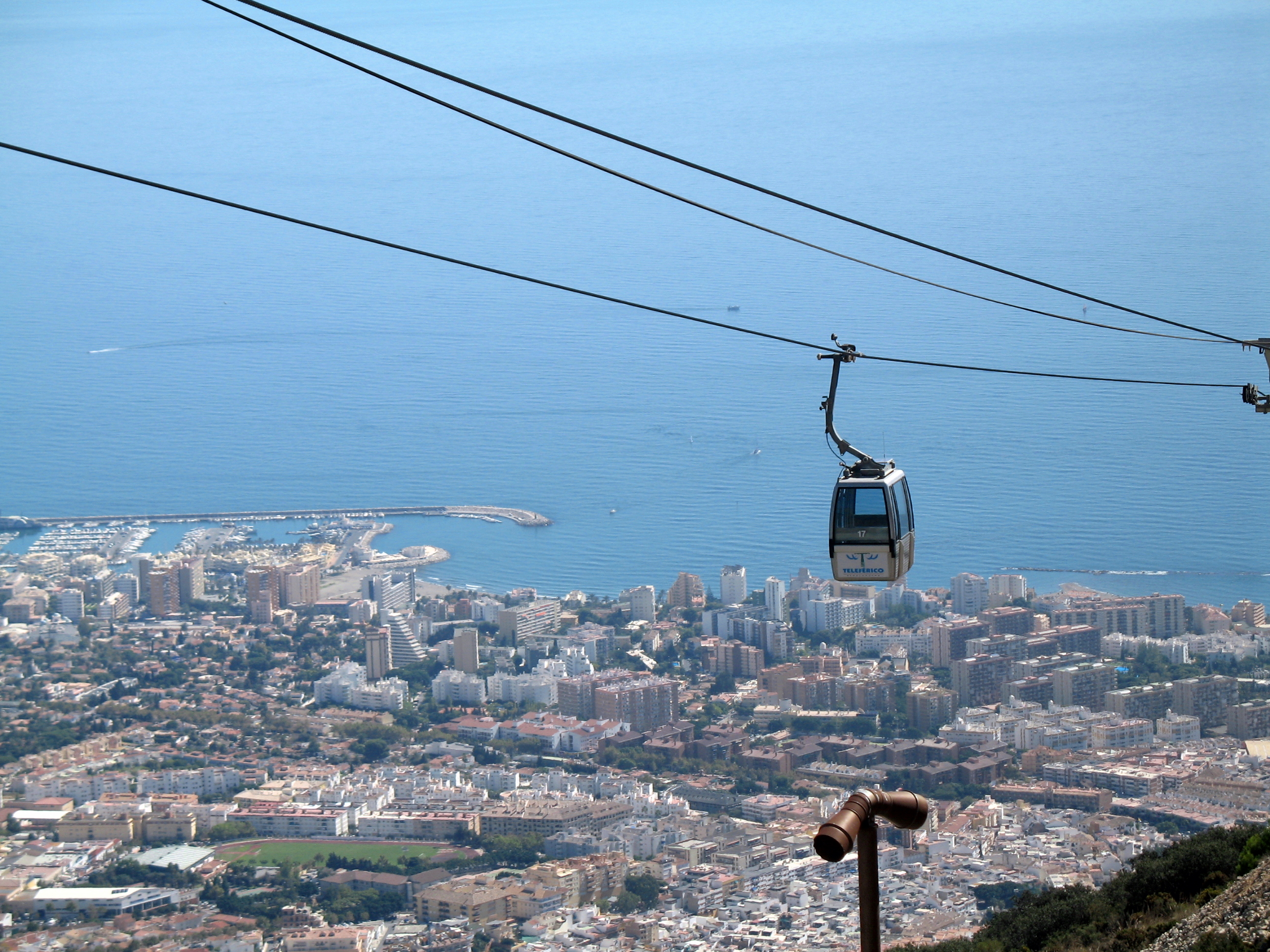 Cabina del teleférico de Banalmádena, provincia de Málaga, España.